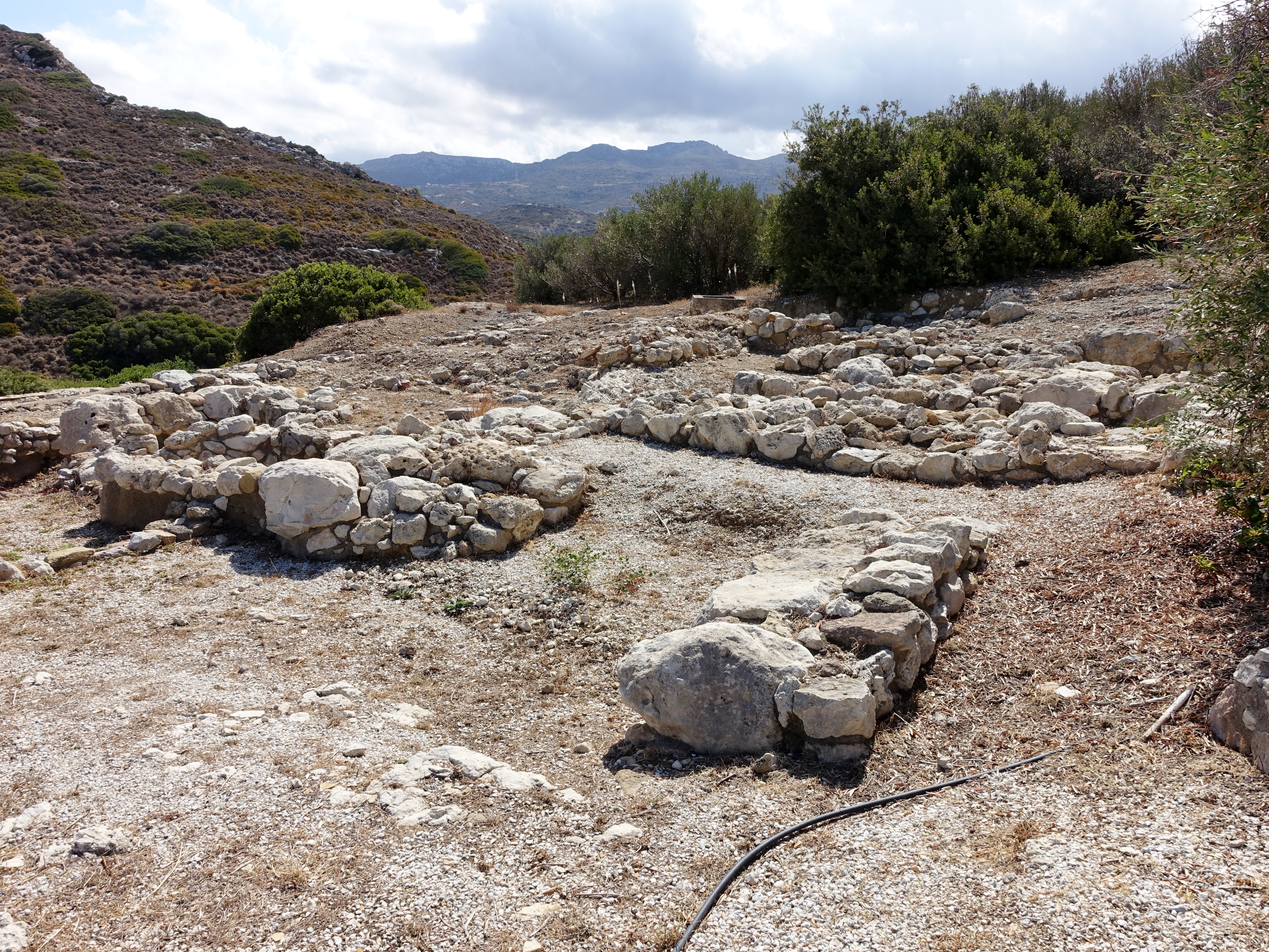 Minoische Ausgrabungsstätte von Petras (Πετράς), Gemeinde Sitia, Kreta, Griechenland